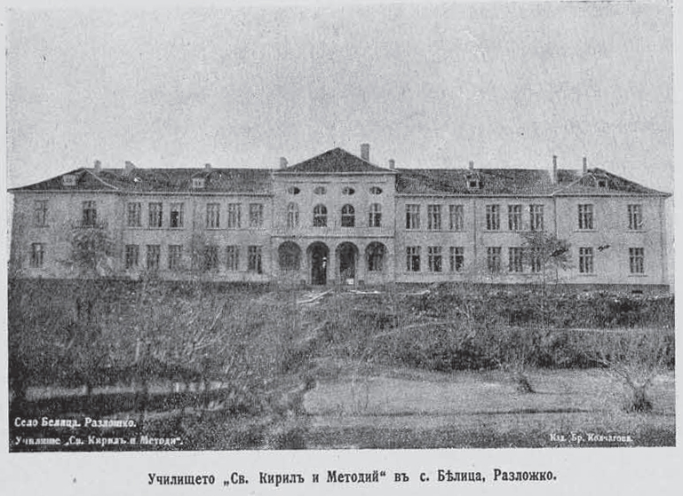 Belitza bulgarian shcool